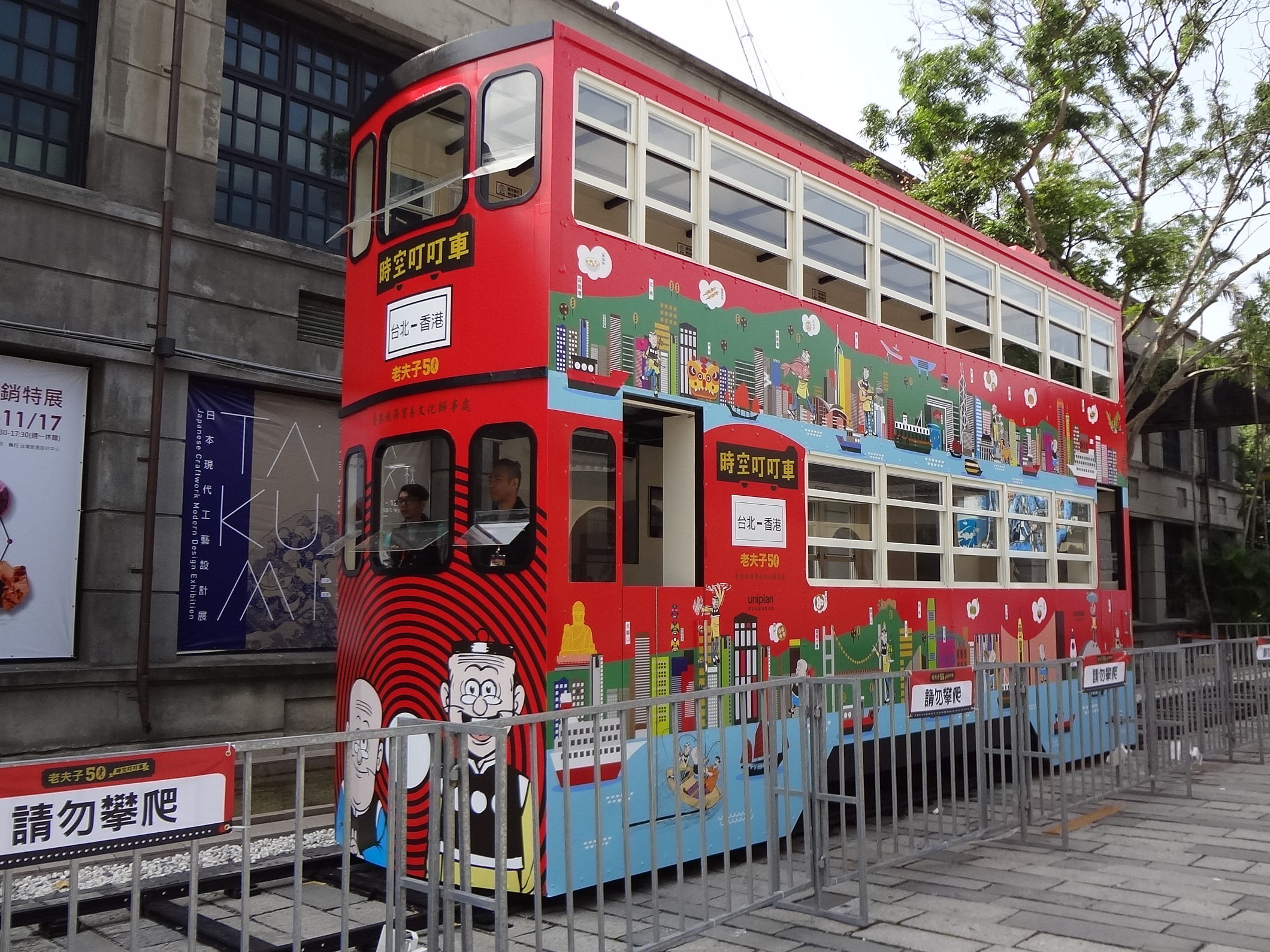 中文（台灣）: 安益國際展覽公司於臺北市松山文化創意園區展示的老夫子時空叮叮車。